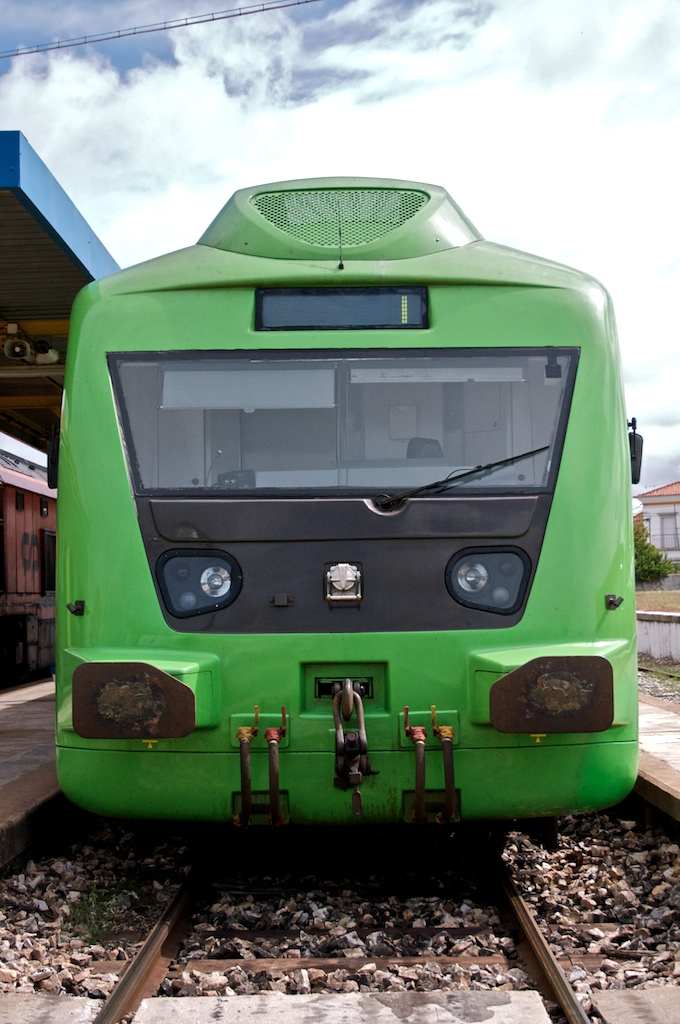 Local: Estação de Évora [Linha de Évora, PK 116] Data e hora: 22 de Maio de 2008 [10h41] Material: Automotora 0357 [Unidade Simples Diesel - Allan Renovada (EMEF/GOP)] N.º UIC: 90 94 803 0357-9